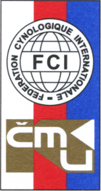 detail of the CAC card